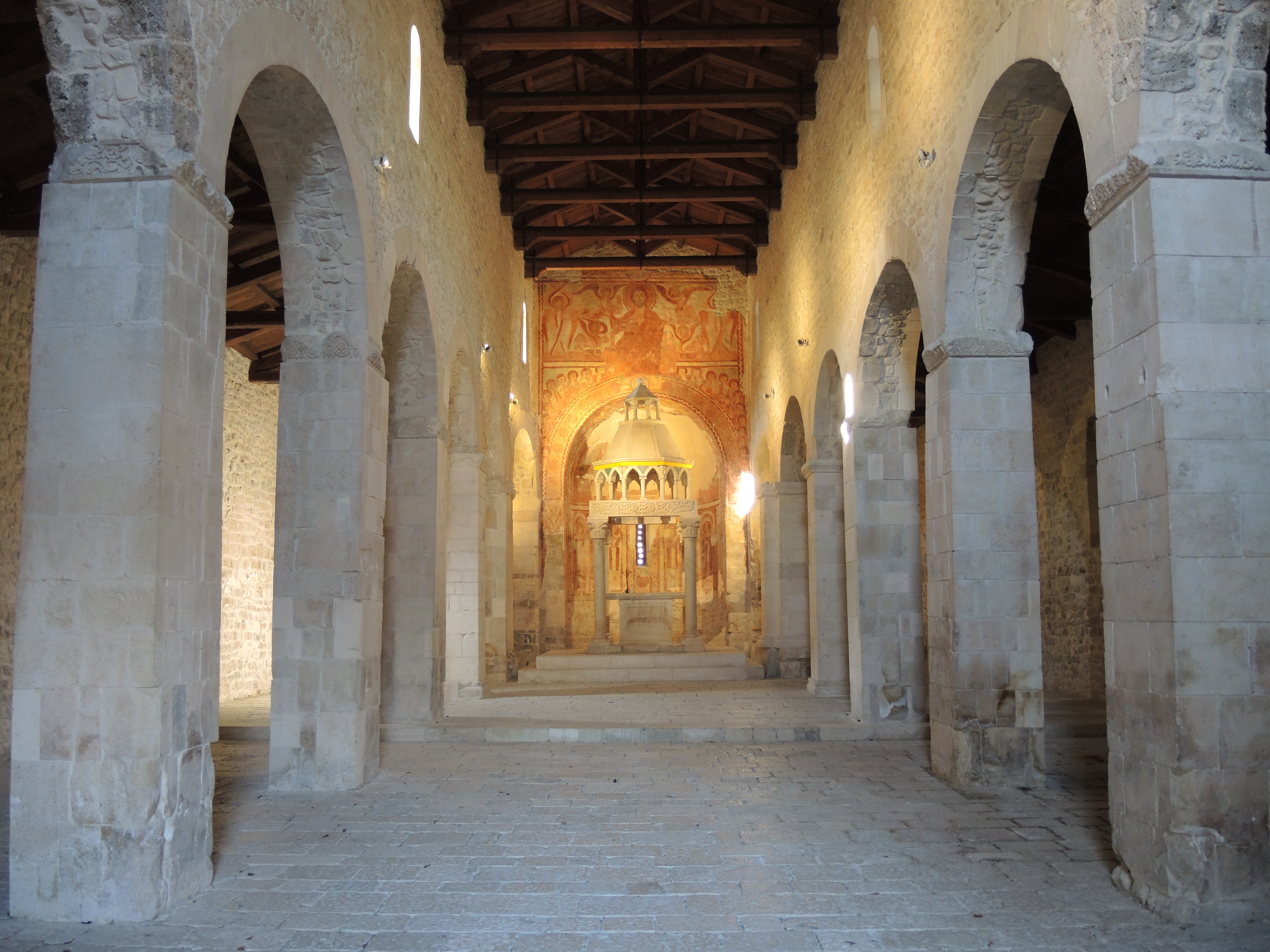 Capestrano (AQ): San Pietro ad Oratorium